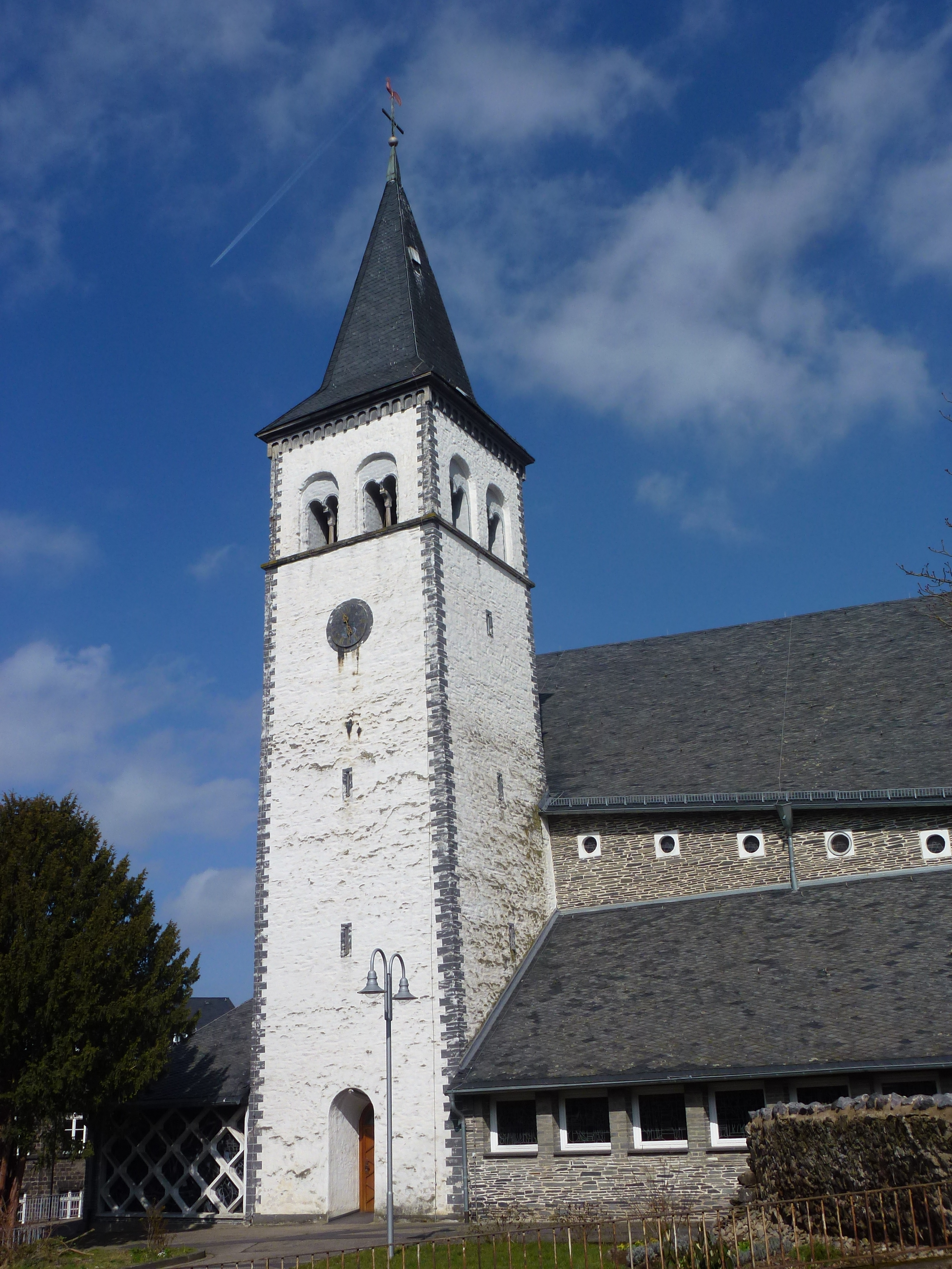 Alter Kirchturm an neuem Kirchgebäude